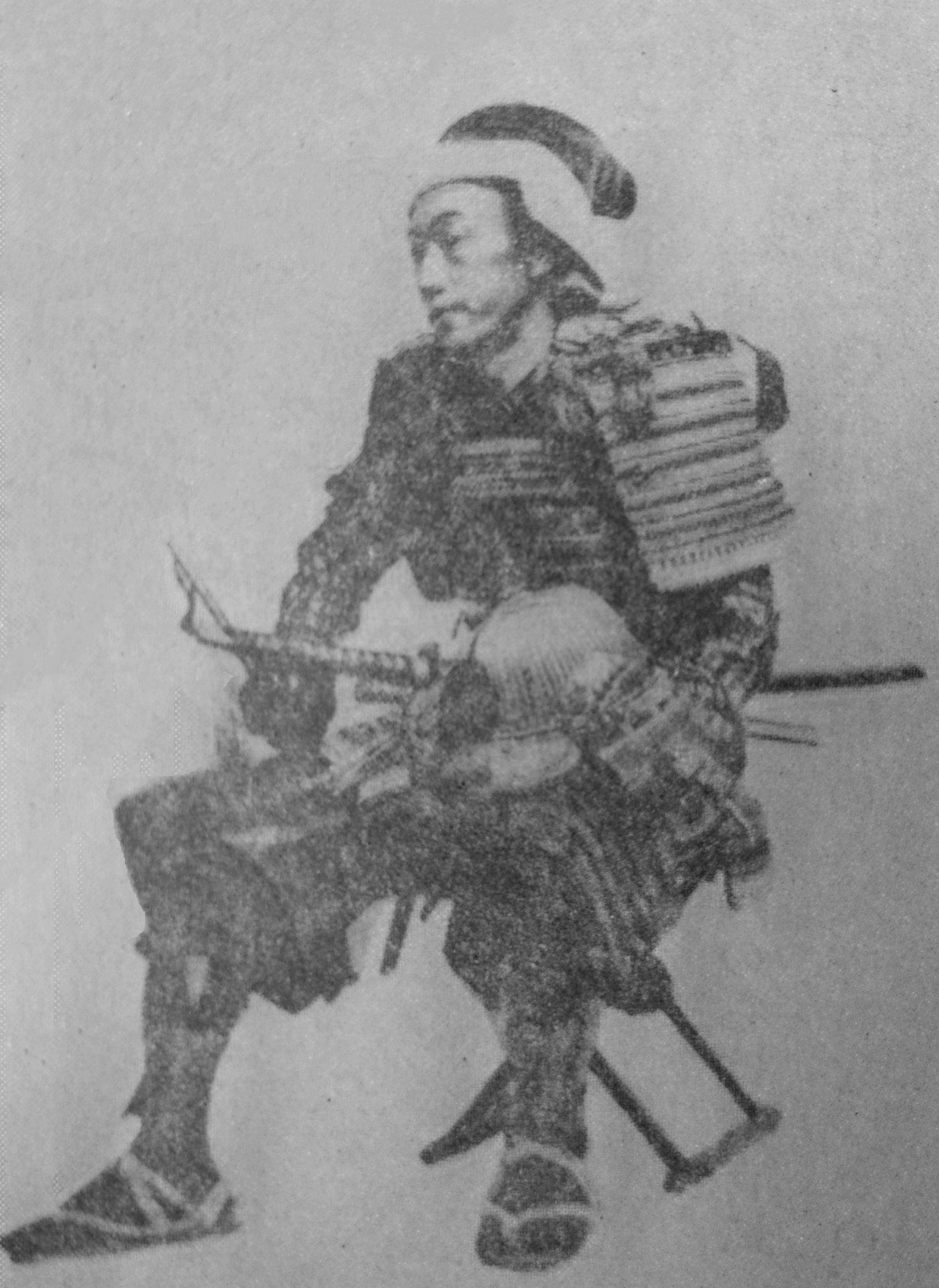 竹中重固の肖像写真。